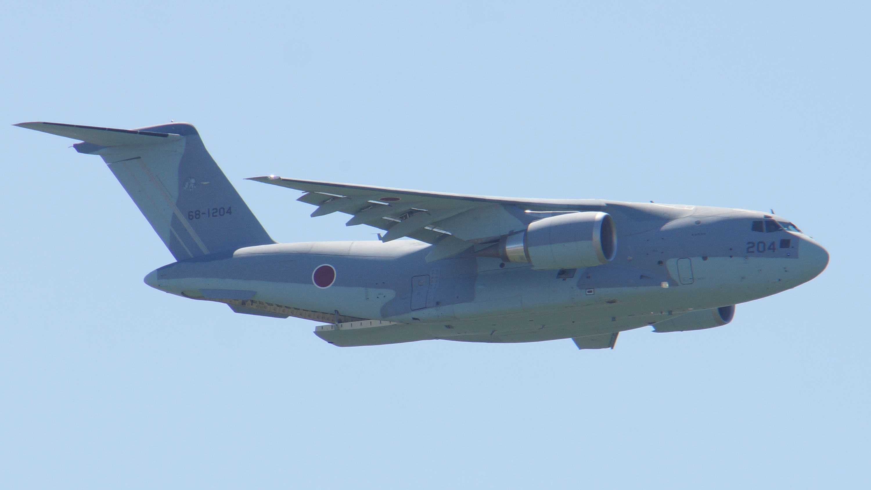 航空自衛隊 C-2輸送機（68-1204号機） 飛行中。2017年5月28日 美保基地にて。